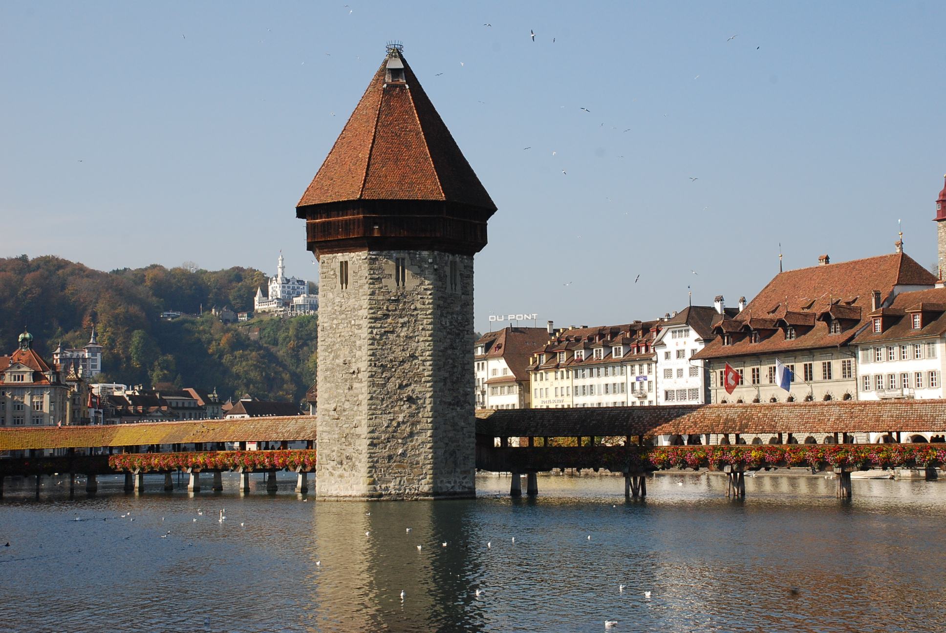 Lucerne Le Pont de la Chapelle